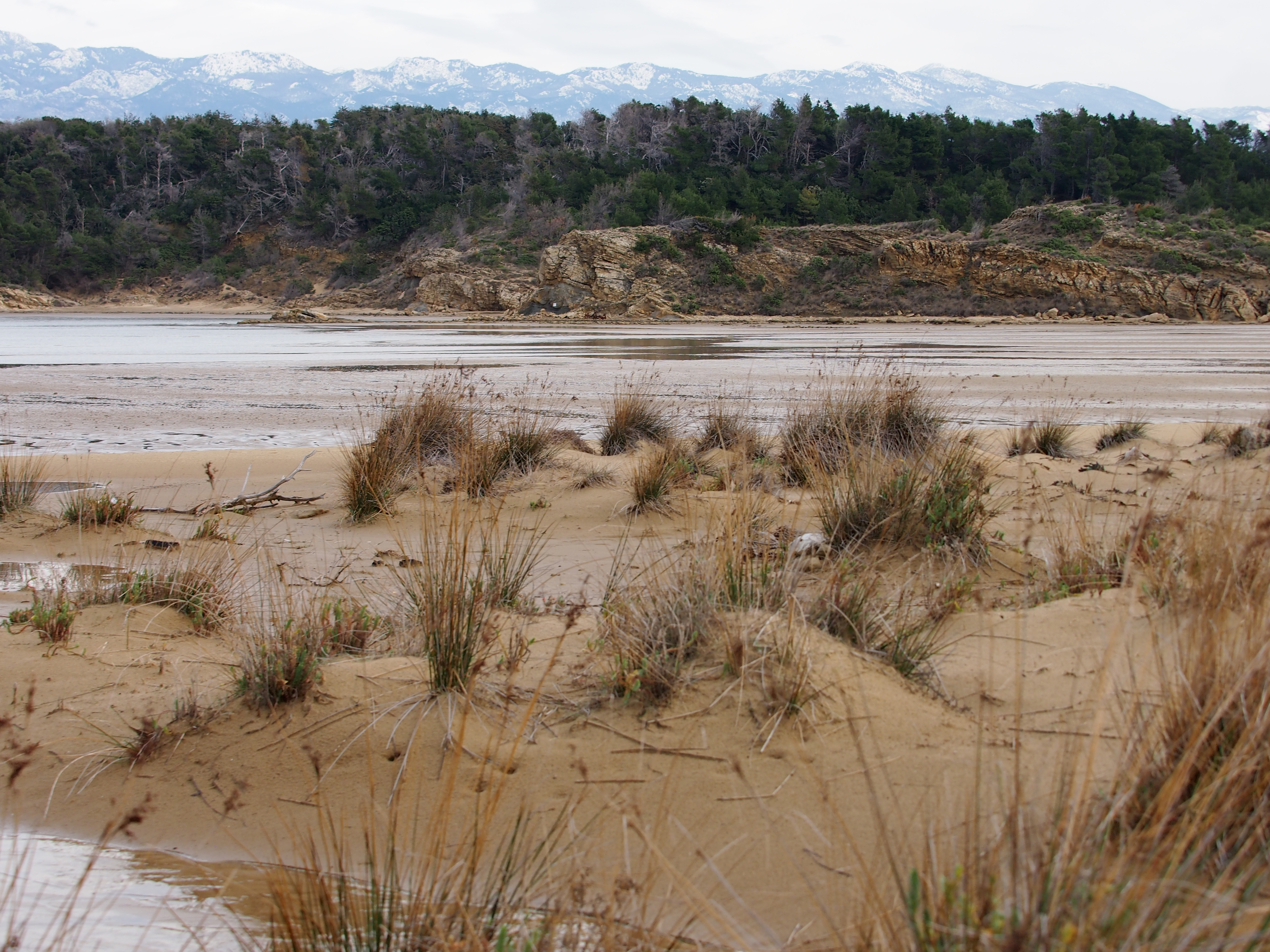 Poluotok Lopar na sjeveroistočnom je dijelu otoku Raba i jedan je od nekoliko primjera zaštićene geološke baštine u Primorsko - goranskoj županiji. Građen je od eocenskih lapora i pješčenjaka koji su nasajali u okolišu estuarija pradavne rije, prije otprilike 40 - 50 milijuna godina.